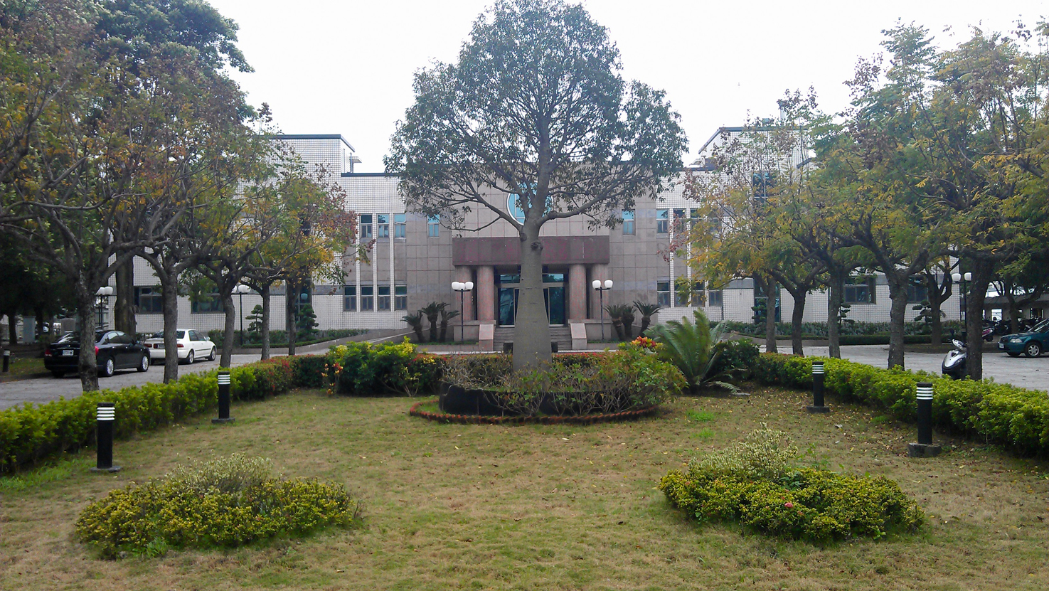 中文（台灣）: 行政院農業委員會農業試驗所作物種原中心，位於臺中市霧峰區。